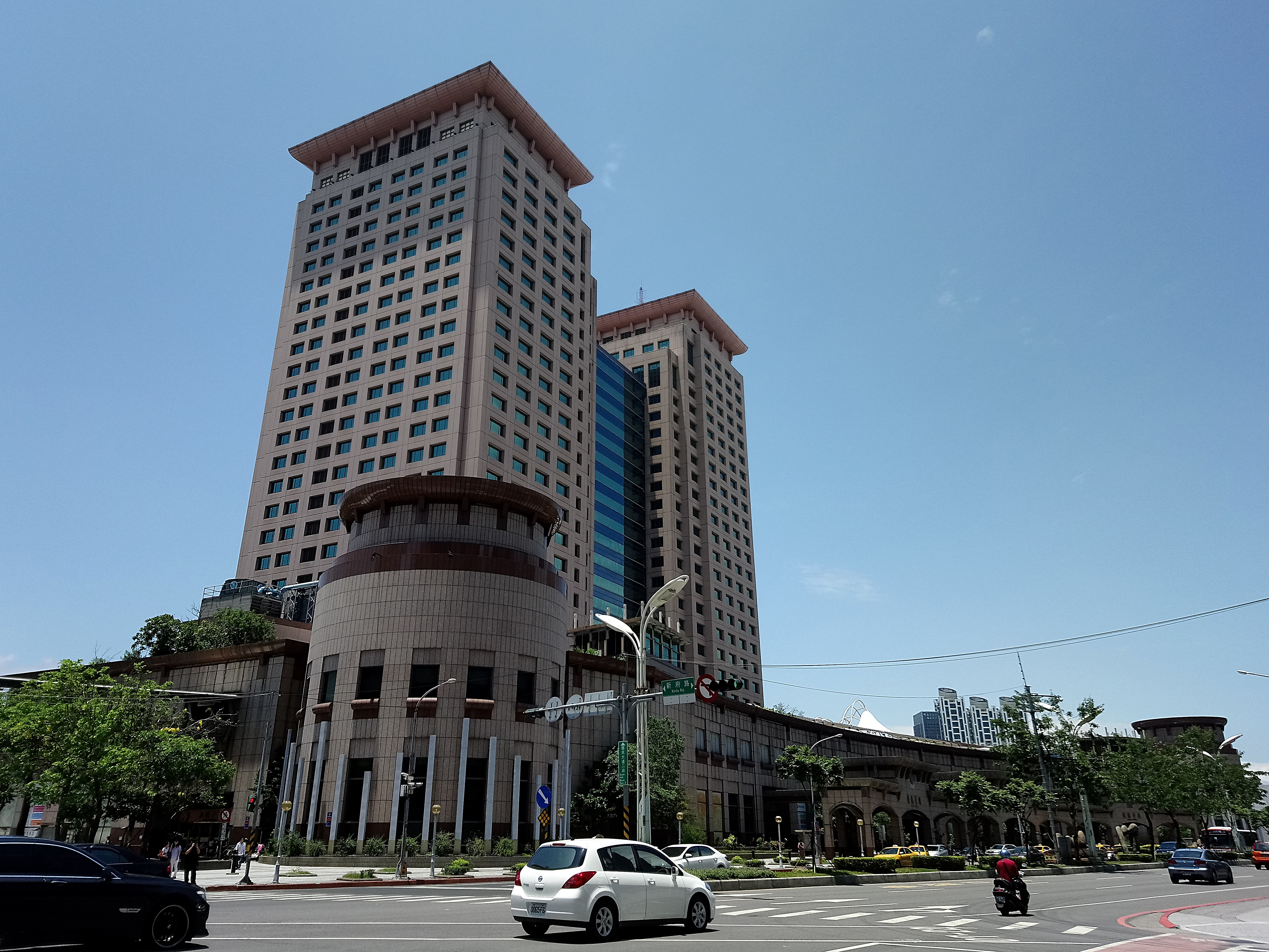 臺鐵板橋車站大樓,新北市板橋區新埔聯合里新民里